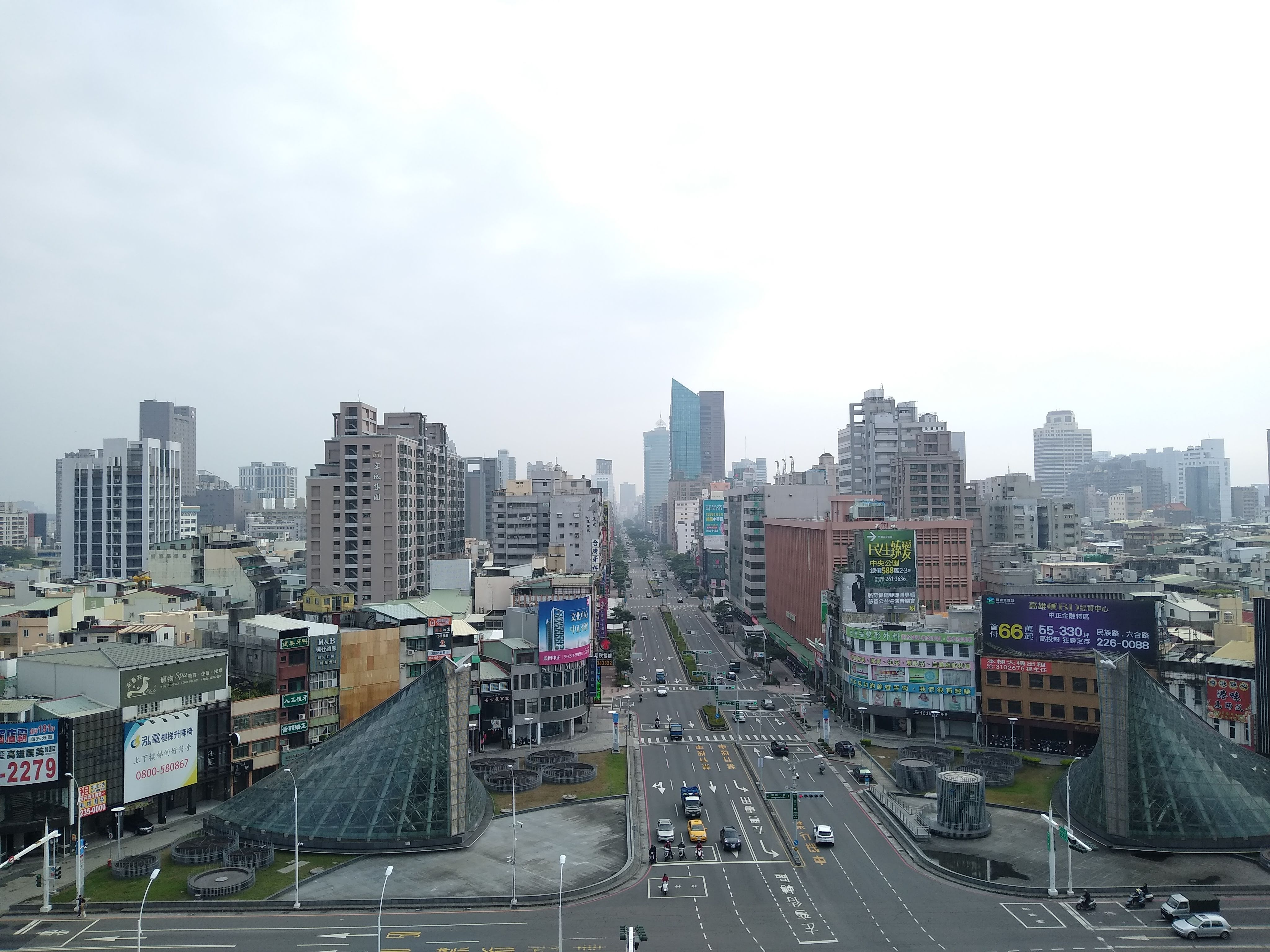 高雄中正三路